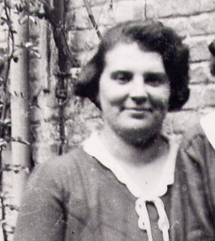 photo de Germaine van Dievoet (1899-1990), (fille de l'architecte Henri van Dievoet et d'Eugénie Masson), championne de Belgique de natation et participante aux jeux Olympiques d'Anvers en 1920. Germaine van DIEVOET, est née à Bruxelles le 26 septembre 1899, décédée le mardi 30 octobre 1990 à Uccle (Clinique des Deux Alices), à l'âge de 91 ans, elle épousa à Uccle le 23 août 1937, Wilhelm (Willy) DESSECKER, né à Francfort-sur-Main le 16 janvier 1901 et décédé à Uccle (Clinique des deux Alices) le 22 mars 1996, à l'âge de 95 ans, fils de Georg Adam Wilhelm Dessecker et de Barbara Wagner